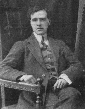 Fotografía del escritor español Pedro de Répide publicada en 1913 cuando escribía crónicas en El Liberal